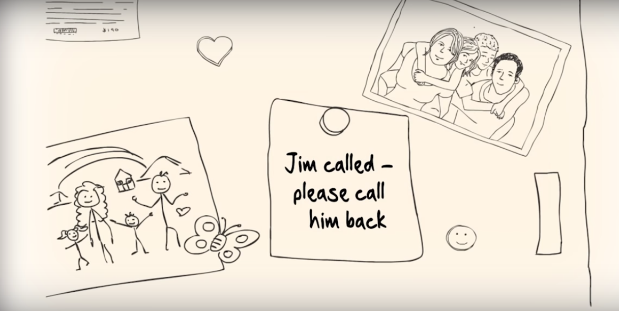 При ПТСР могут иметь место расстройства памяти, индивид вынужден записывать то, что он должен сделать